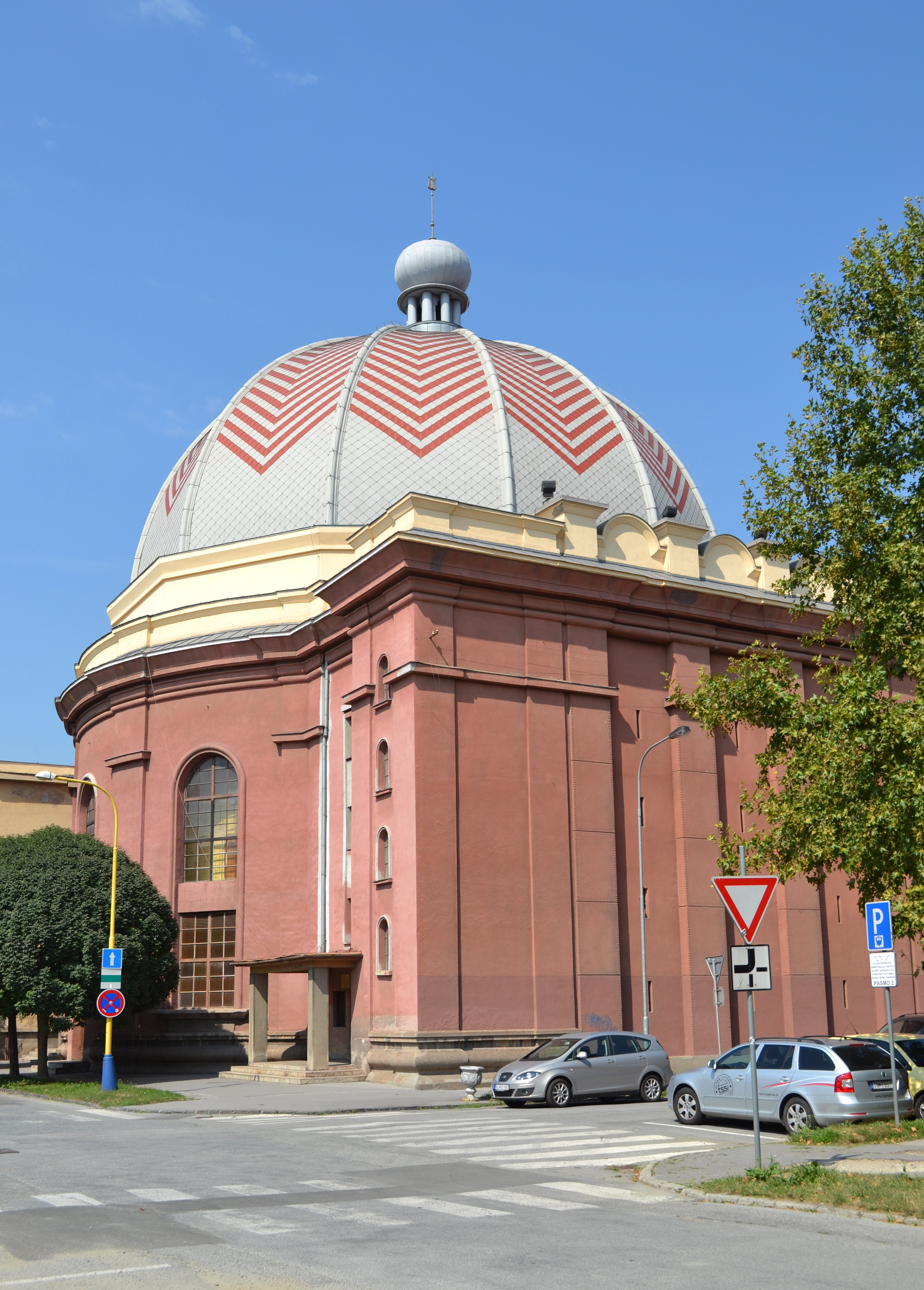 Košická neologická synagóga postavená v roku 1927